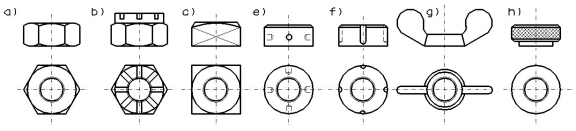 Nakrętki: a) sześciokątne b) koronowe c) czworokątne e) okrągłe otworowe f) okrągłe rowkowe g) skrzydełkowe h) radełkowe